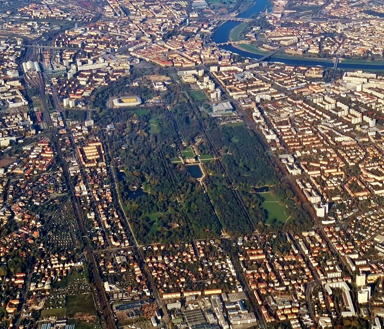 Dresden aus dem Flugzeug gesehen